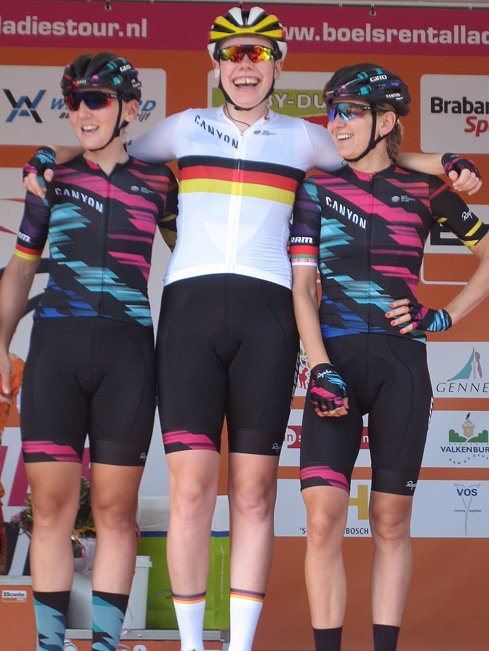 Team Canyon-SRAM (Lisa Brennauer, Mieke Kröger, Alena Amialiusik) voor start 3e etappe Holland Ladies Tour 2016